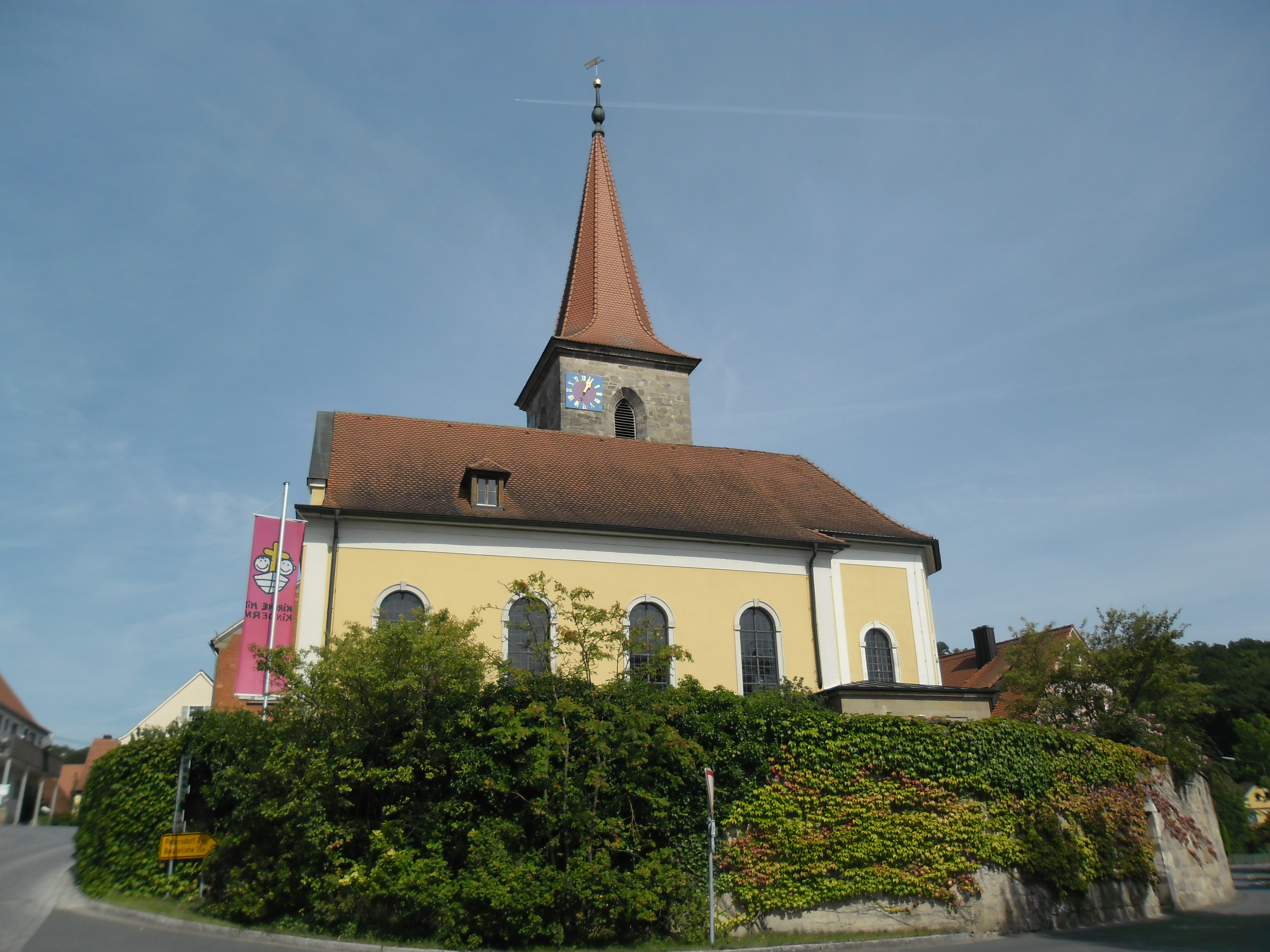 Saalkirche (1713) mit mittelalterlichem Turm